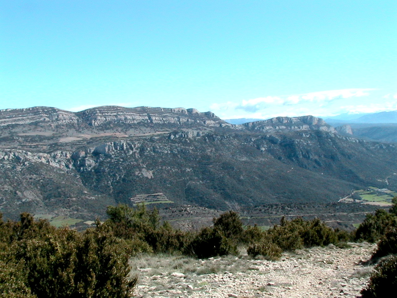 Sector oriental del Montsec de Rúbies des de la muntanya de Sant Mamet This is a a photo of a natural area in Catalonia, Spain, with id: ES510192